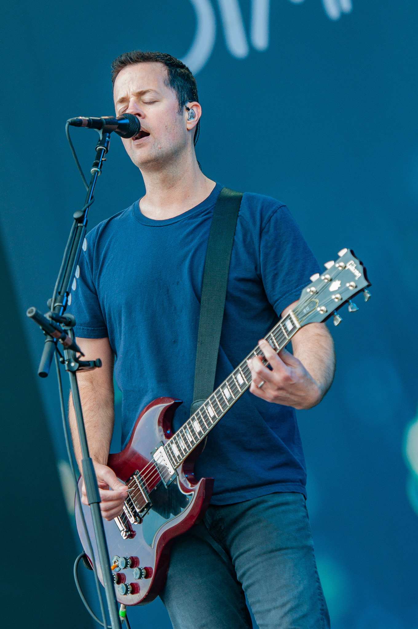 ARGO-Konzerte,Festival,Jimmy Eat World,Konzert,Livekonzert,Livemusik,Musik,RiP,Rock im Park 2018,Tom Linton,Zeppelin Stage